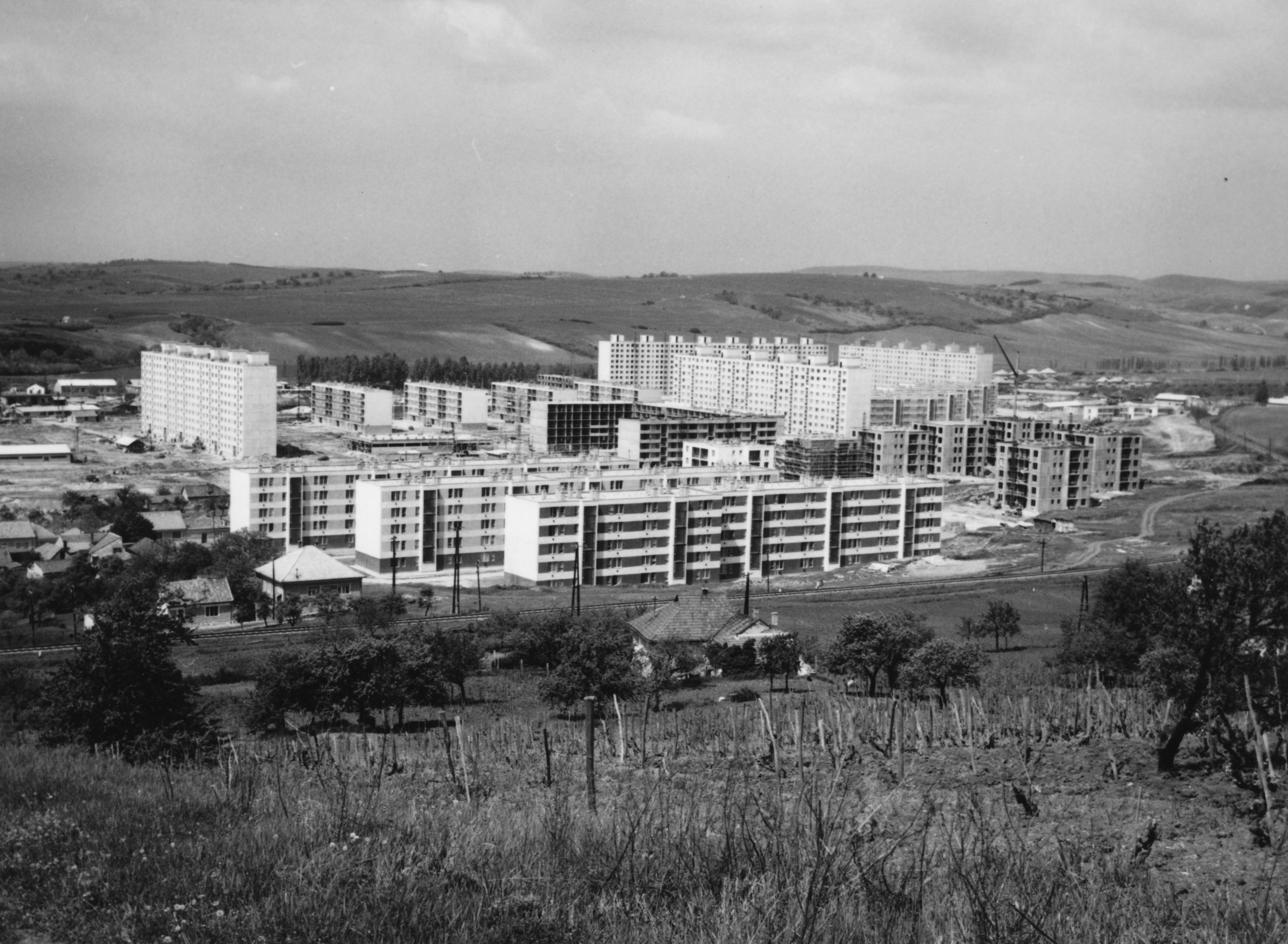 Csebokszári lakótelep. Location: Hungary, Eger Title: Csebokszári lakótelep.